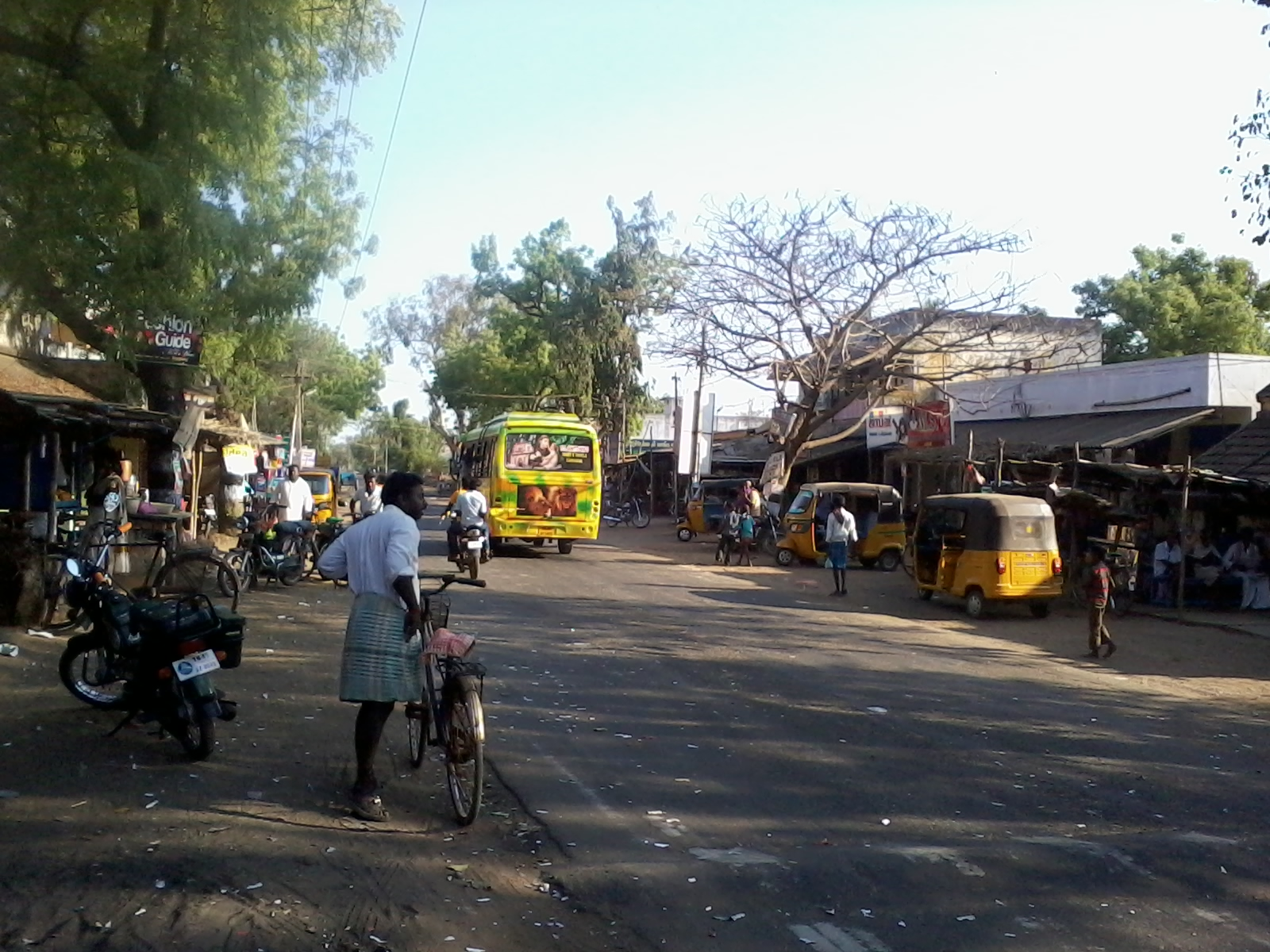 எரிச்சி